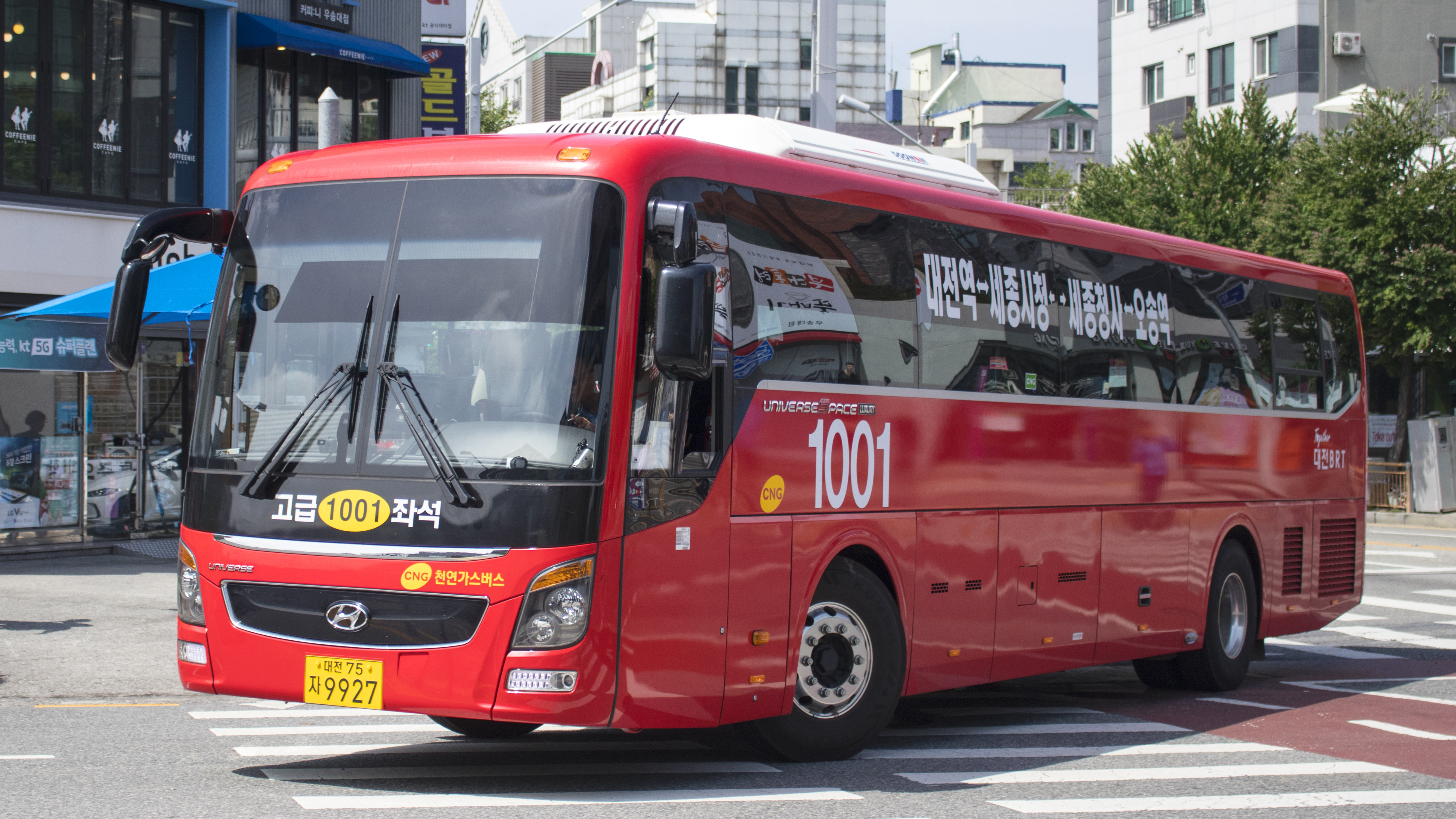 대전시내버스 1001번 2019년식 현대 유니버스 스페이스 럭셔리 CNG